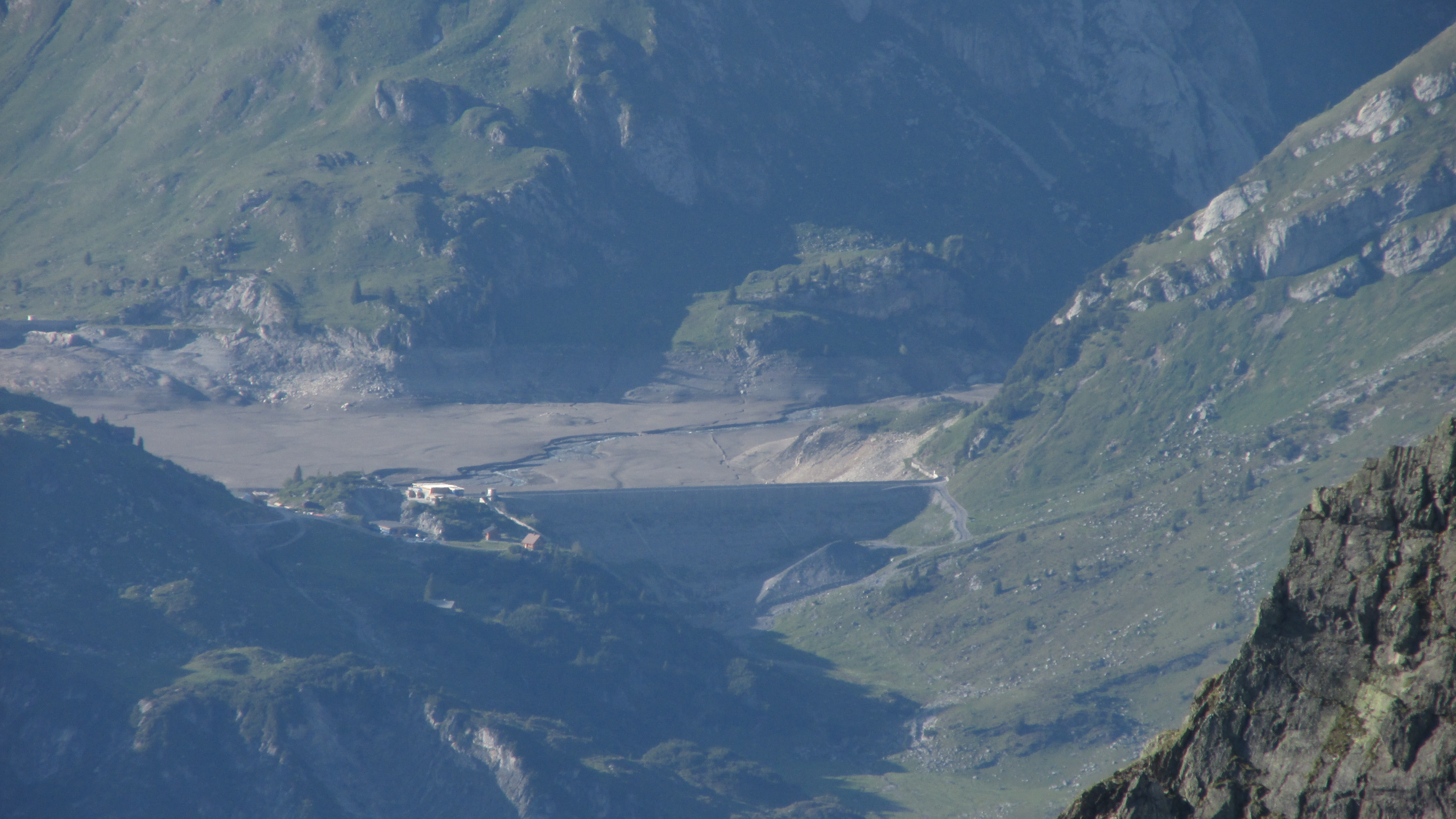 Blick vom Hochburtschakopf (2683 m) auf den abgelassenen Spullersee